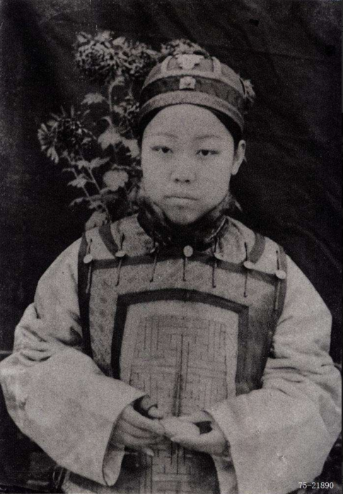 醇贤亲王侧福晋刘佳氏，载沣、载洵、载涛之母，溥仪祖母